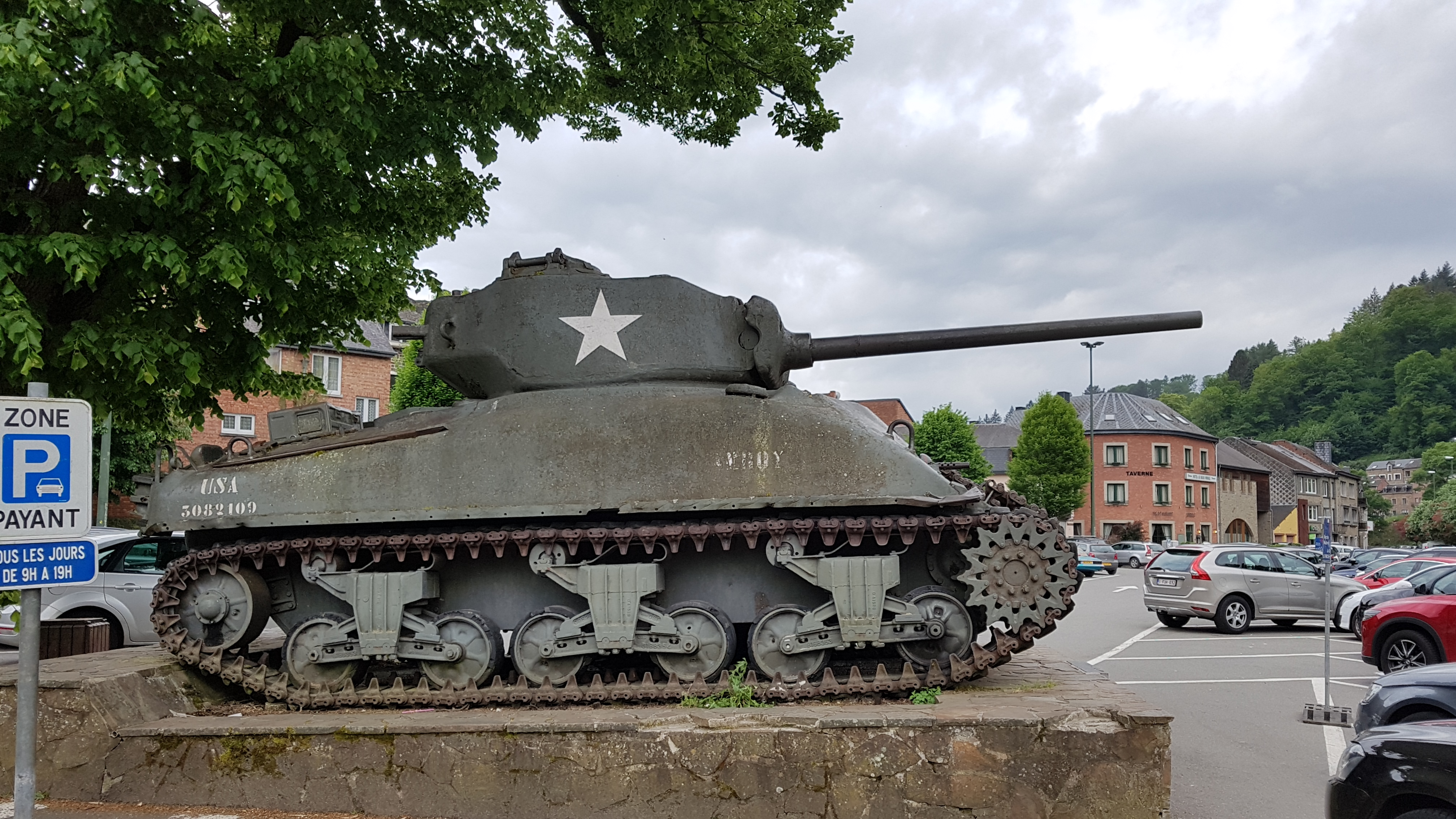 M4A1 Sherman in La Roche-en-Ardenne